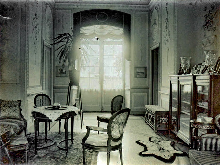 Interieur van kasteel Meerssenhoven bij Itteren-Maastricht in 1910. Het 18e-eeuwse kasteel werd indertijd bewoond door Edmond Regout (1870-1926), mogelijk ook de fotograaf, die het kasteel in 1902 na zijn wereldreizen verwierf. Het berenvel en de oosterse kist herinneren aan die reizen. De kristallen vazen op de kast zijn vrijwel zeker afkomstig uit het familiebedrijf van de Regouts. Fotocollectie RHCL Maastricht, GAM 9113.